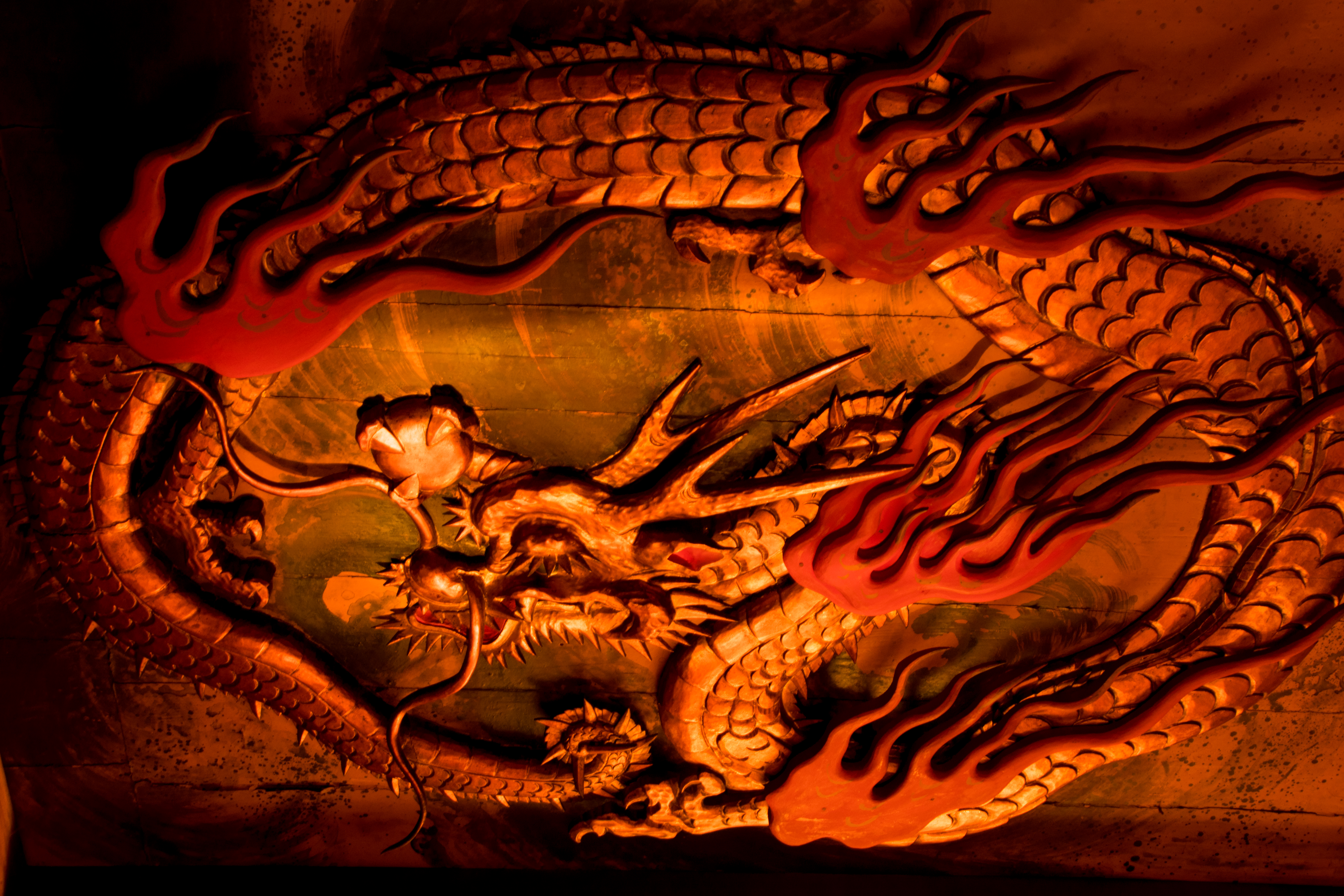 勝山城（岡山県真庭市）にあったとされる飾り天井。明治の廃藩置県にともない民間の手に渡り、真庭市久世の民家（現在は、ギークハウス真庭）の２階天井部に埋められいる。保存状態は非常に良い。